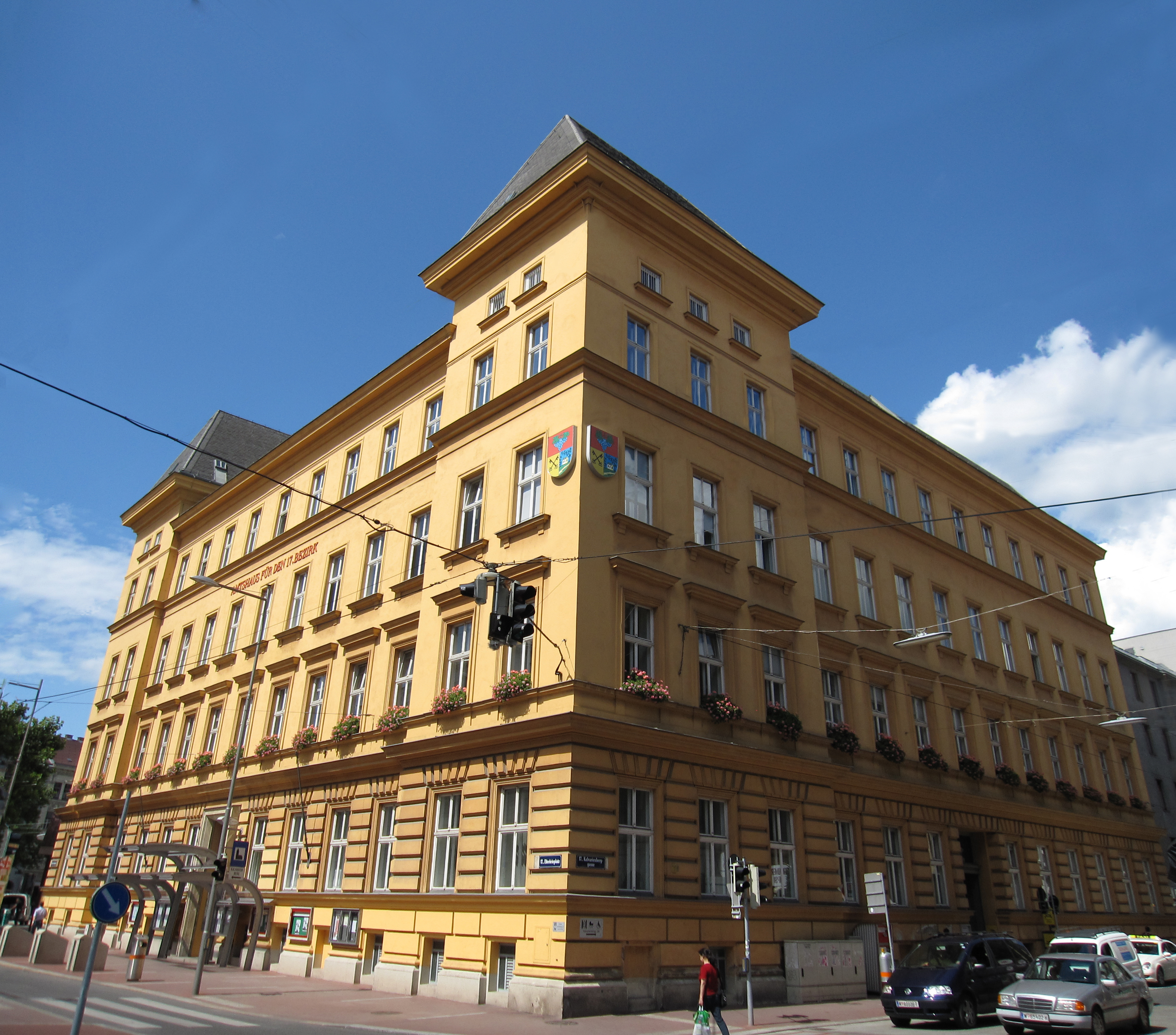 Bezirksamt Hernals in Wien.